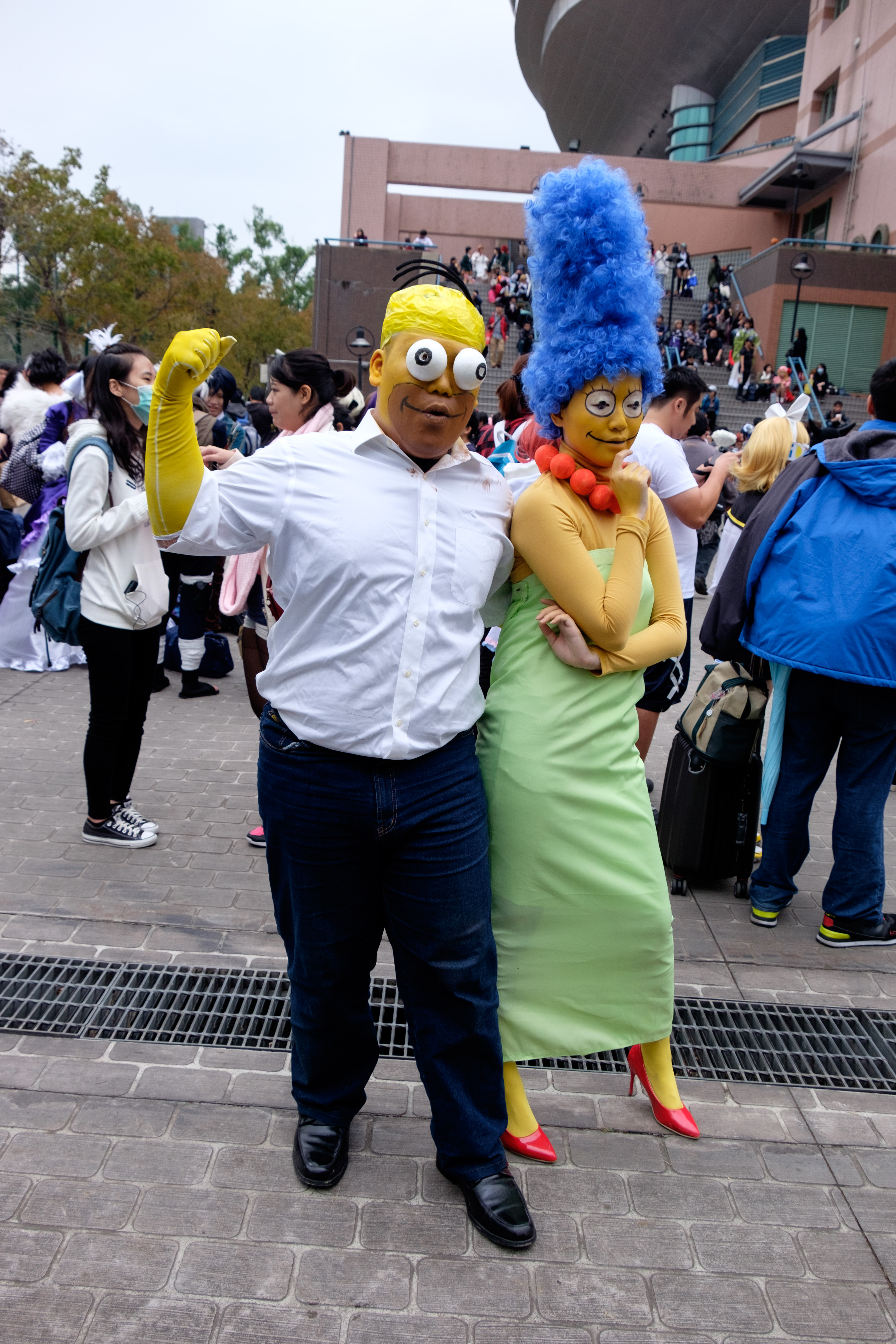 中文（台灣）: CWT41第一日下午，《辛普森家庭》荷馬·辛普森（左）與美枝·辛普森（右）cosplayers。